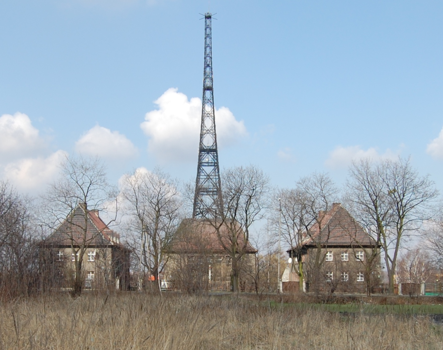 Gliwice - radiostacja widziana od ul. Tarnogorskiej